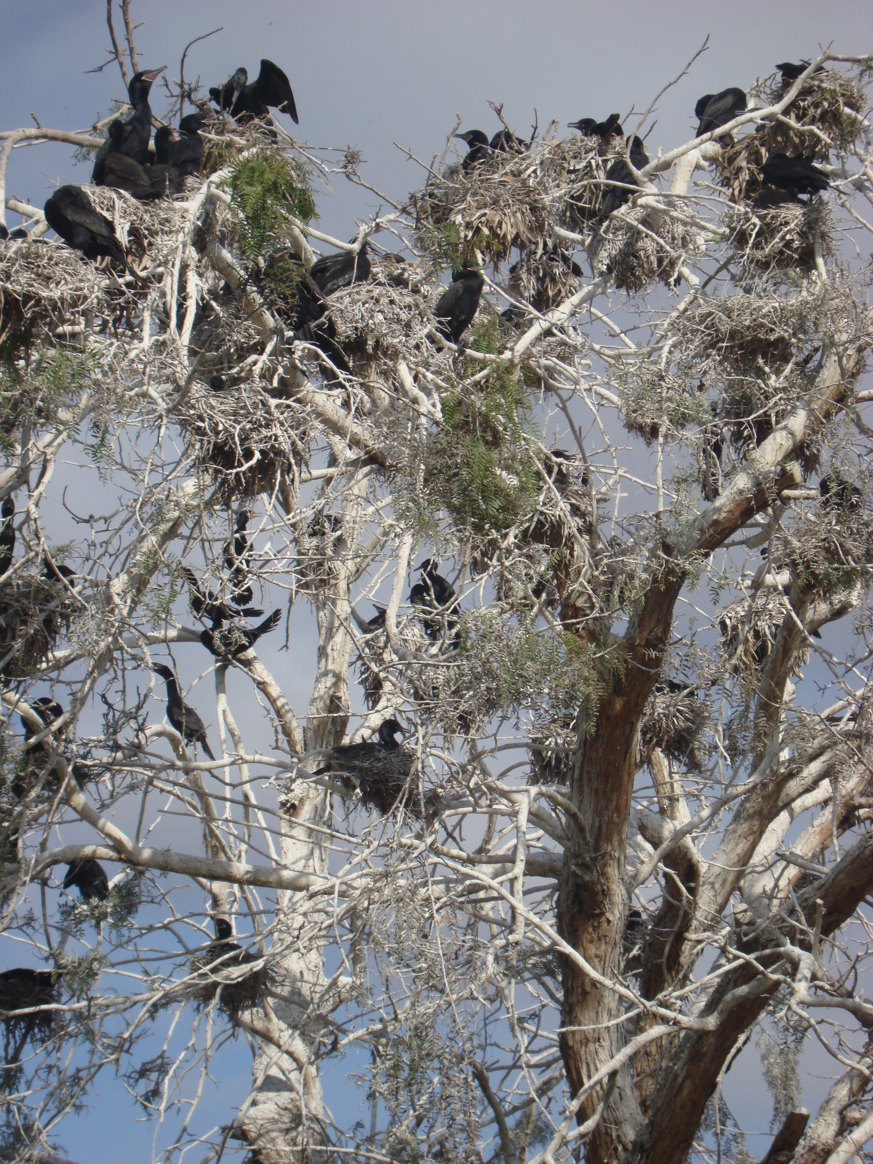 Plaga de Phalacrocorax brasilianus (pato yeco) en Iquique